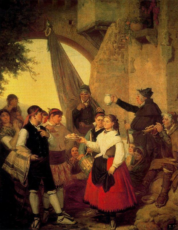 "La ofrenda" por Valeriano Domínguez Bécquer, tradición y fiesta popular en el Moncayo la vispera del santo patrono. Museo del Prado de Madrid.